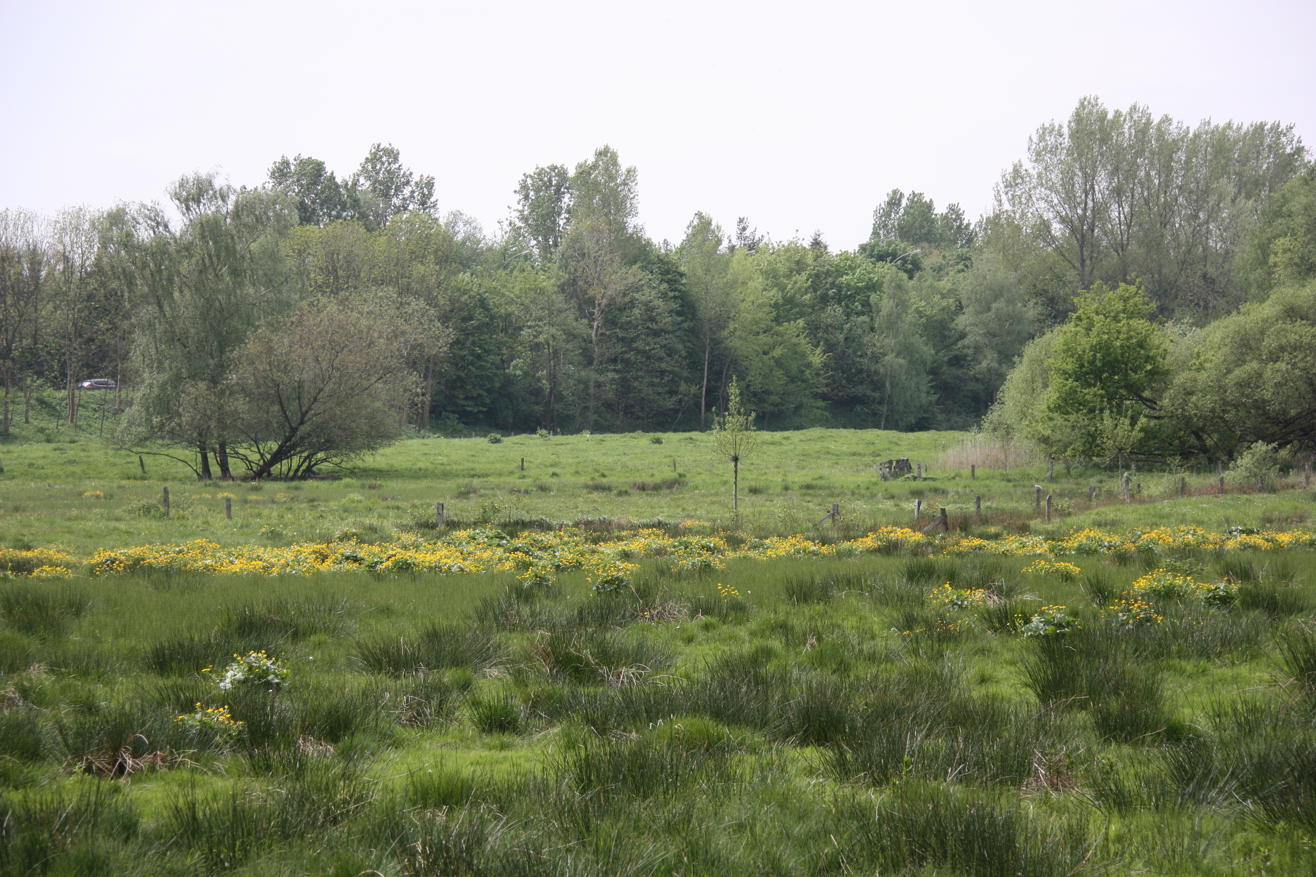 Hamburg, Rahlstedt, Stellmoorer Tunneltal, Wiesen vor der Straße Höltigbaum